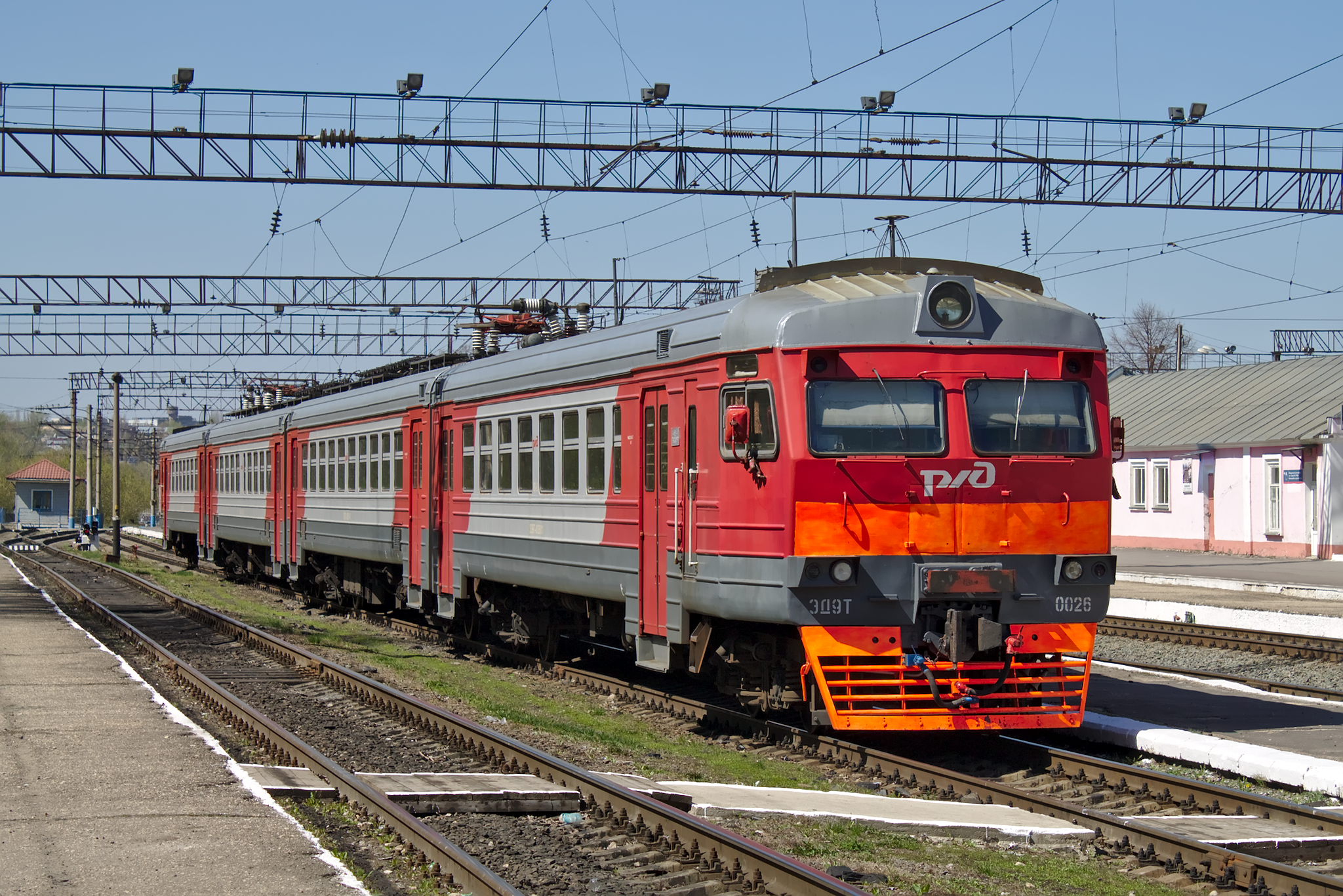 ЭД9Т-0026, станция Елец. см. фото 590895 в альбоме автора